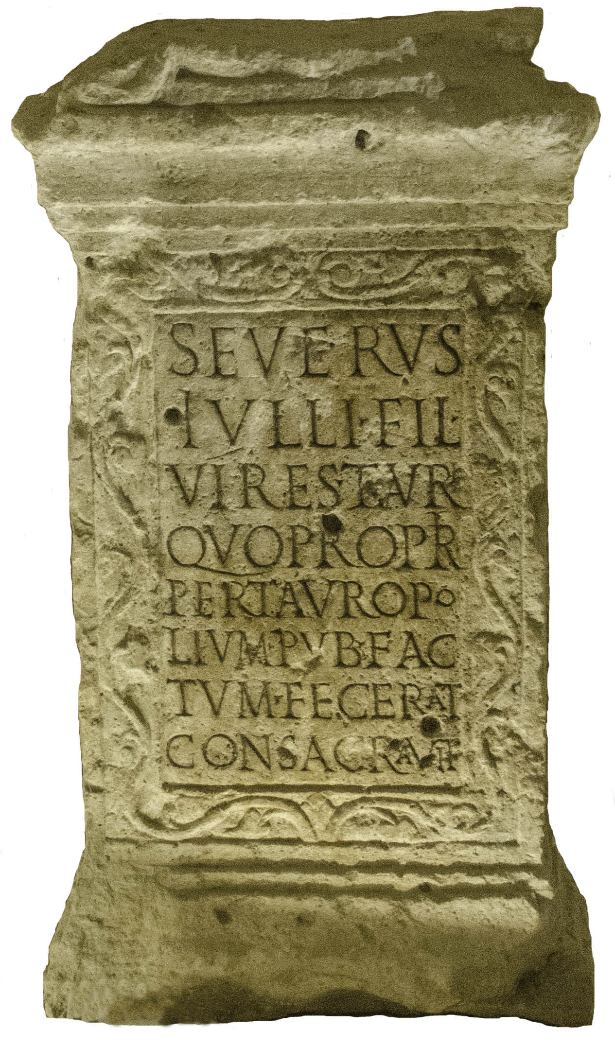 Autel taurobolique de Severus. Musée Eugène-Camoreyt de Lectoure, Gers, France.